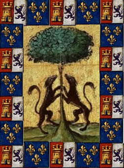 Escudo de los Pizarro del Pozo de Málaga